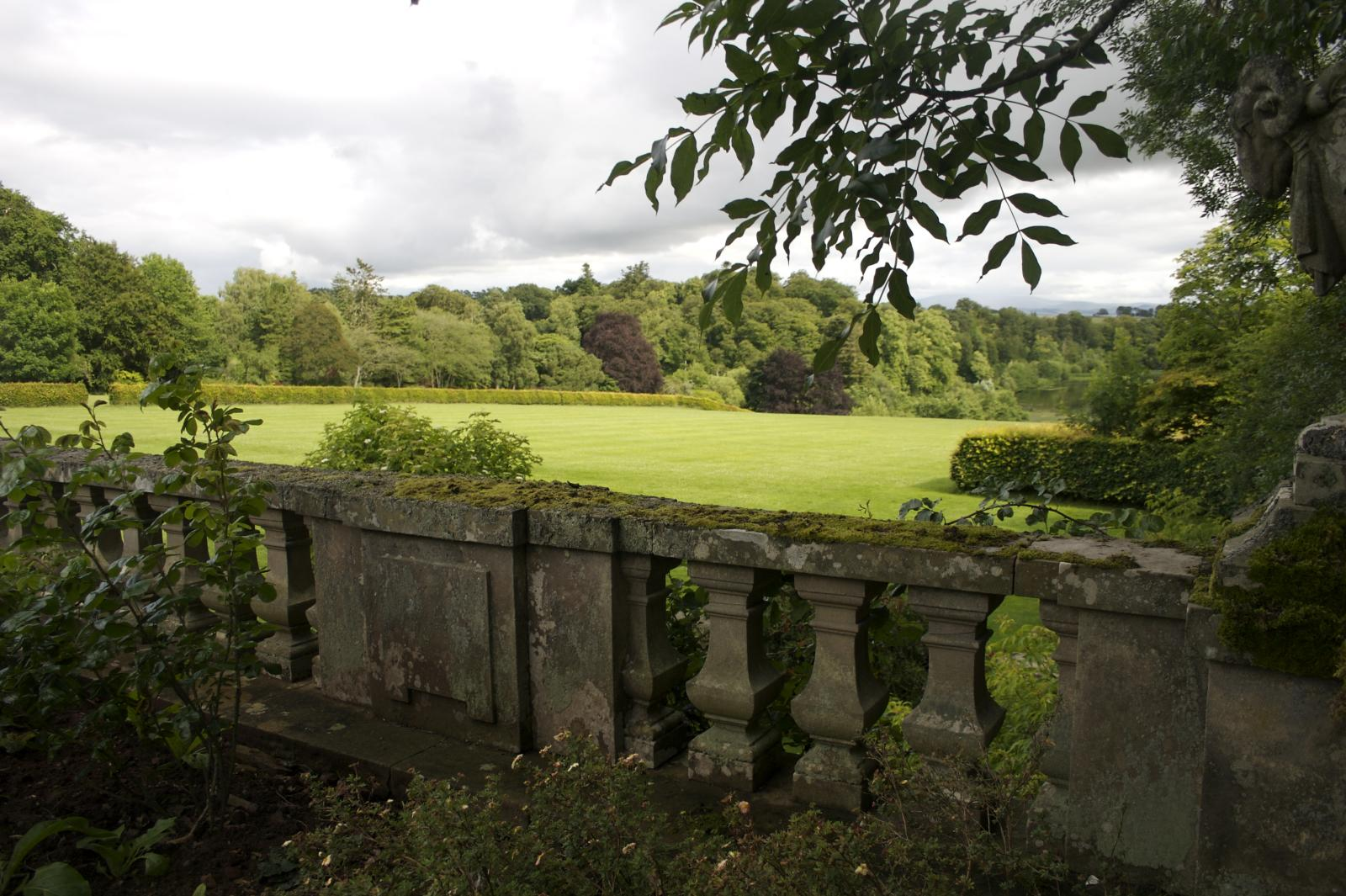 Mellerstain